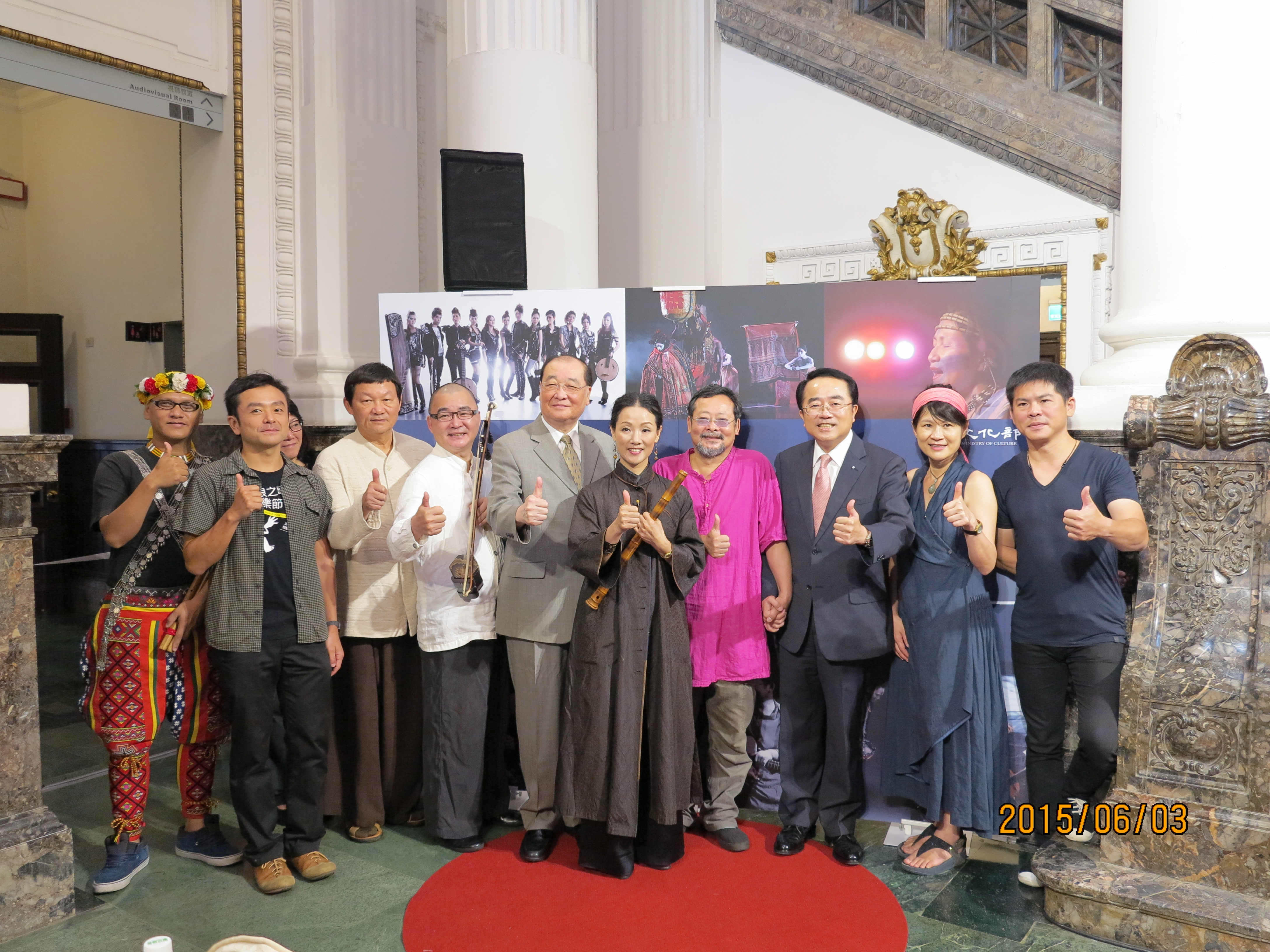 亞東關係協會會長李嘉進（右三）應邀出席中華民國文化部主辦的臺北駐日經濟文化代表處臺灣文化中心「臺灣文化週行前記者會」，與文化部部長洪孟啟（左五）及與會之文化界人士合影留念。